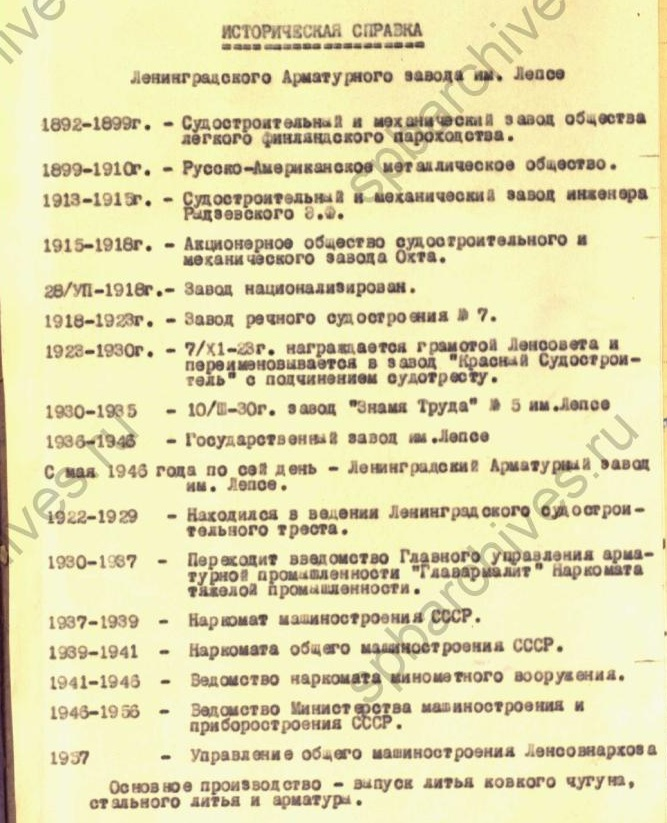 Копия страницы архивной записи